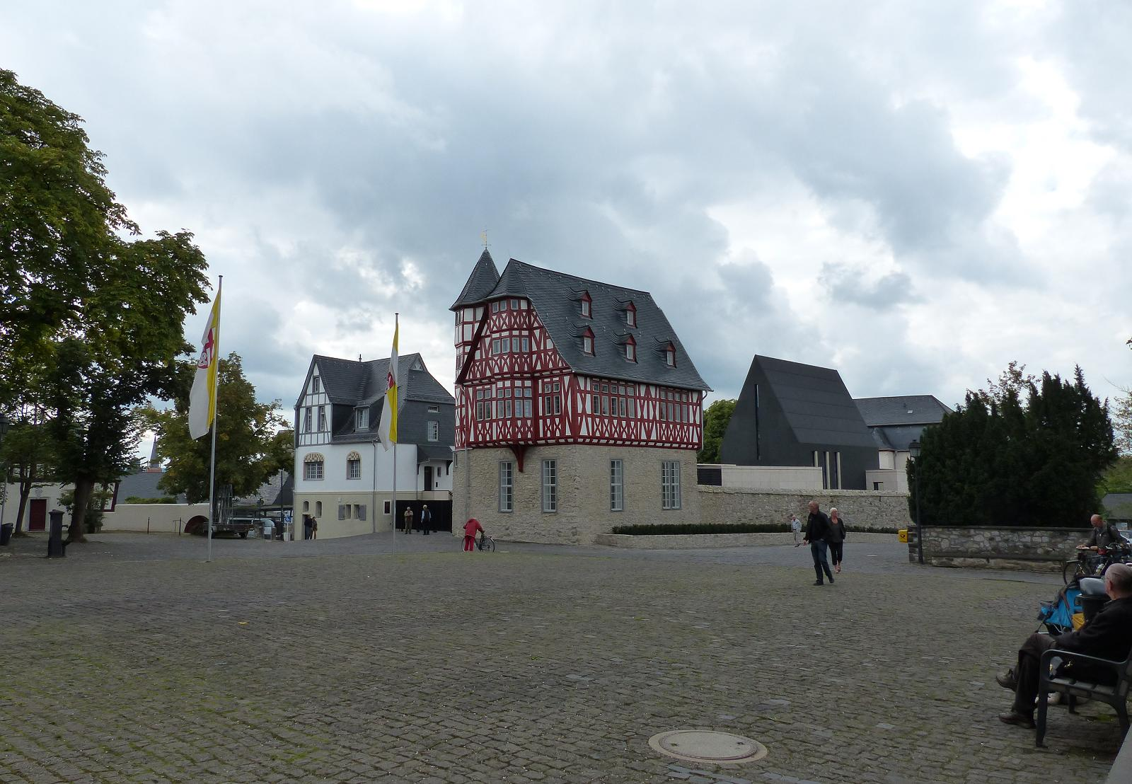 Haus Staffel und Haus Domplatz 6 sowie die neue Kapelle am Domplatz in Limburg an der Lahn